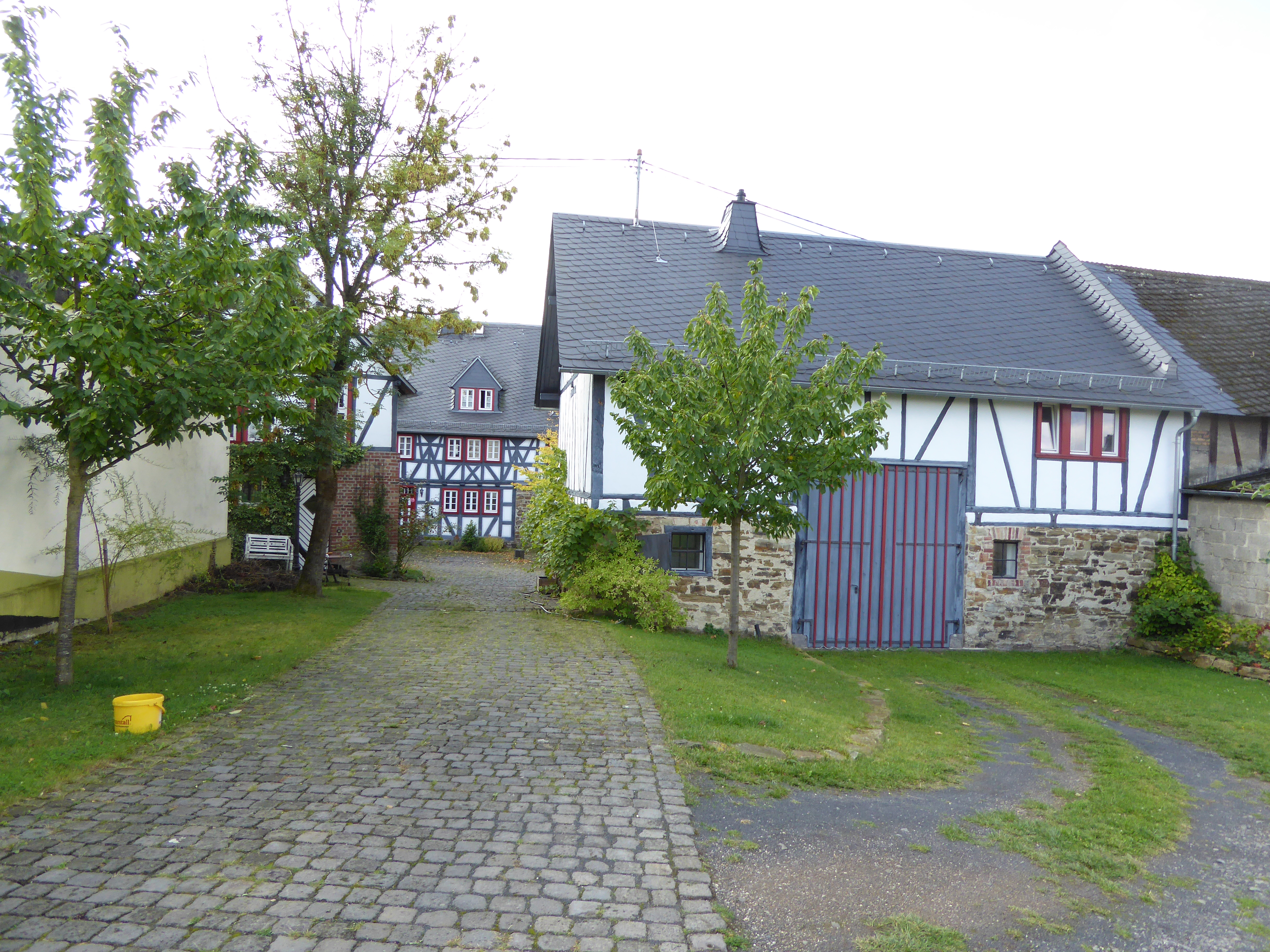 Simmern (Westerwald), Barbarahof, Siebenbornstraße 1, 18. Jahrhundert Streuhof; stattliches Fachwerkhaus, teilweise massiv, 18. Jahrhundert, Fachwerk-Wirtschaftsgebäude, teilweise massiv, 18. und 19. Jahrhundert